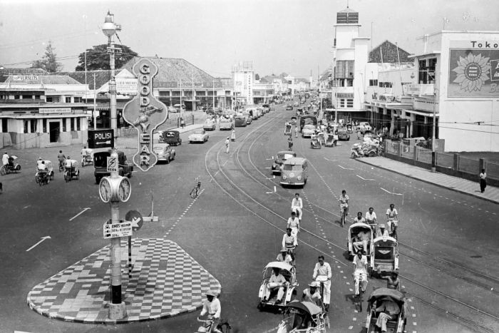 Repronegatief. Gezicht op de drukke winkelwijk Toendjoengan, Soerabaja, Java